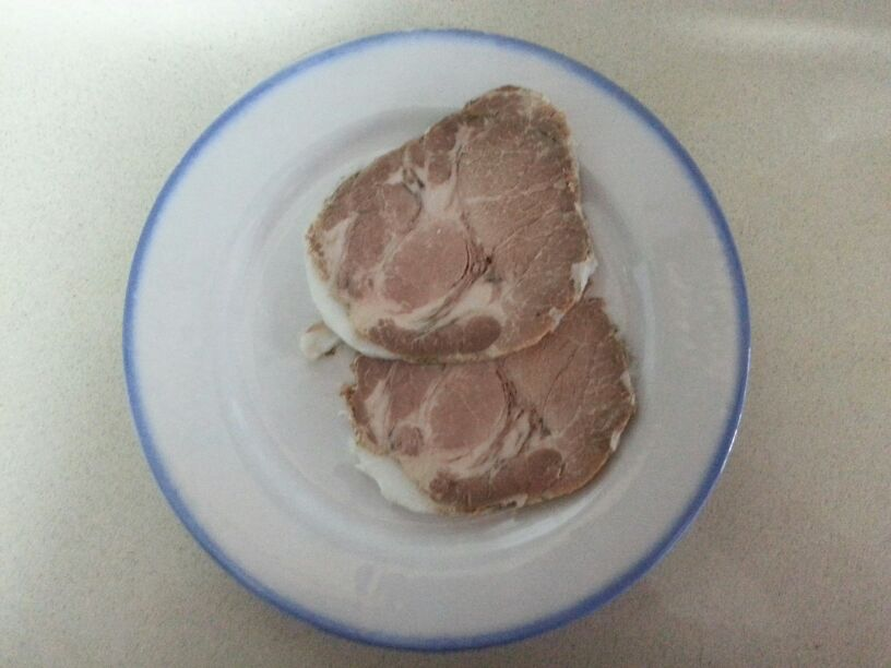 Carne mechada de cabecera de lomo de cerdo en manteca, Cádiz, España.